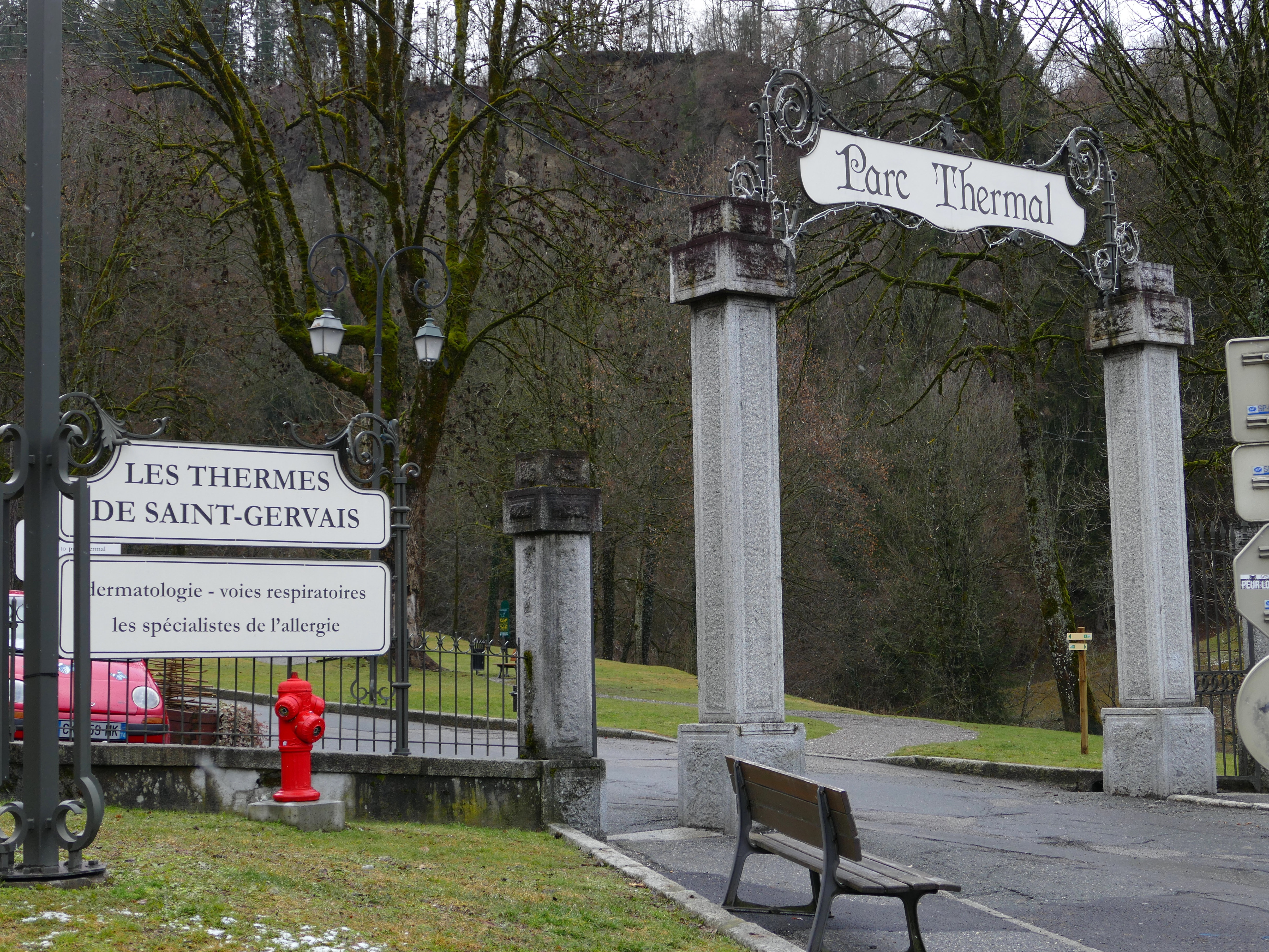 Entrée du Parc Thermal au Fayet (Saint-Gervais-les-Bains, Haute-Savoie).